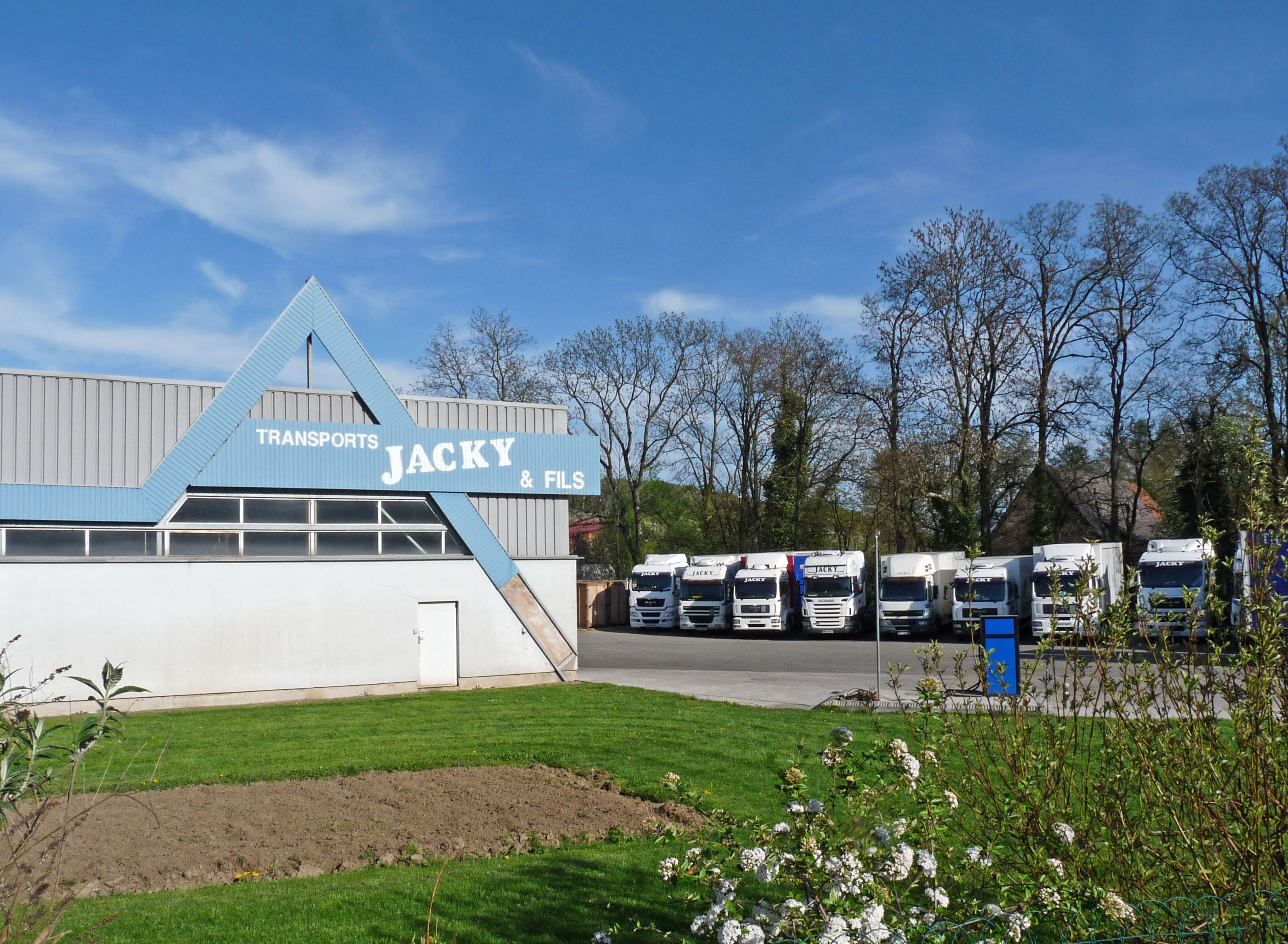 Entreprise de transports à Cleebourg (Bas-Rhin)